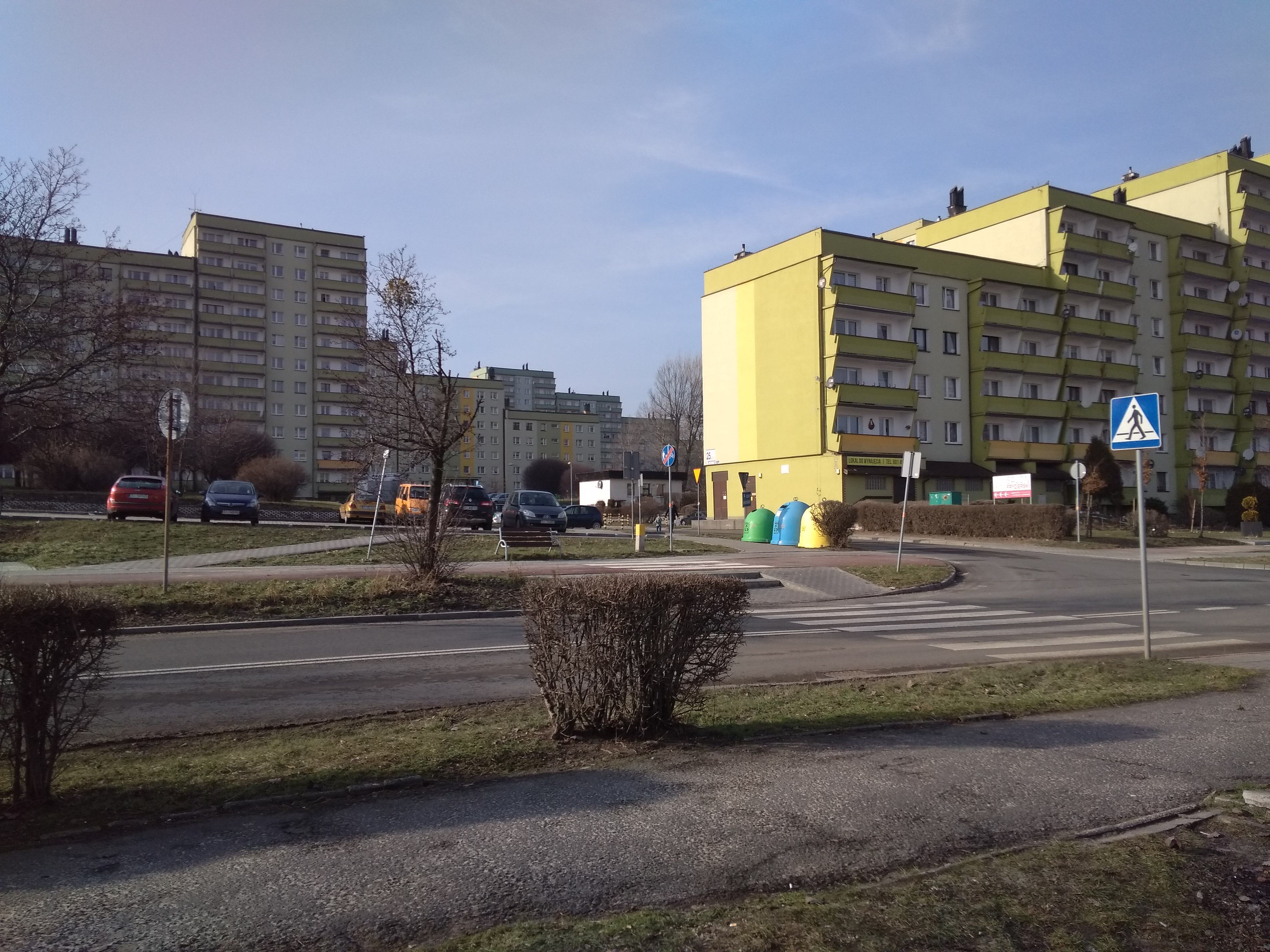 Wschodnia część osiedla Węzłowiec w Siemianowicach Śląskich